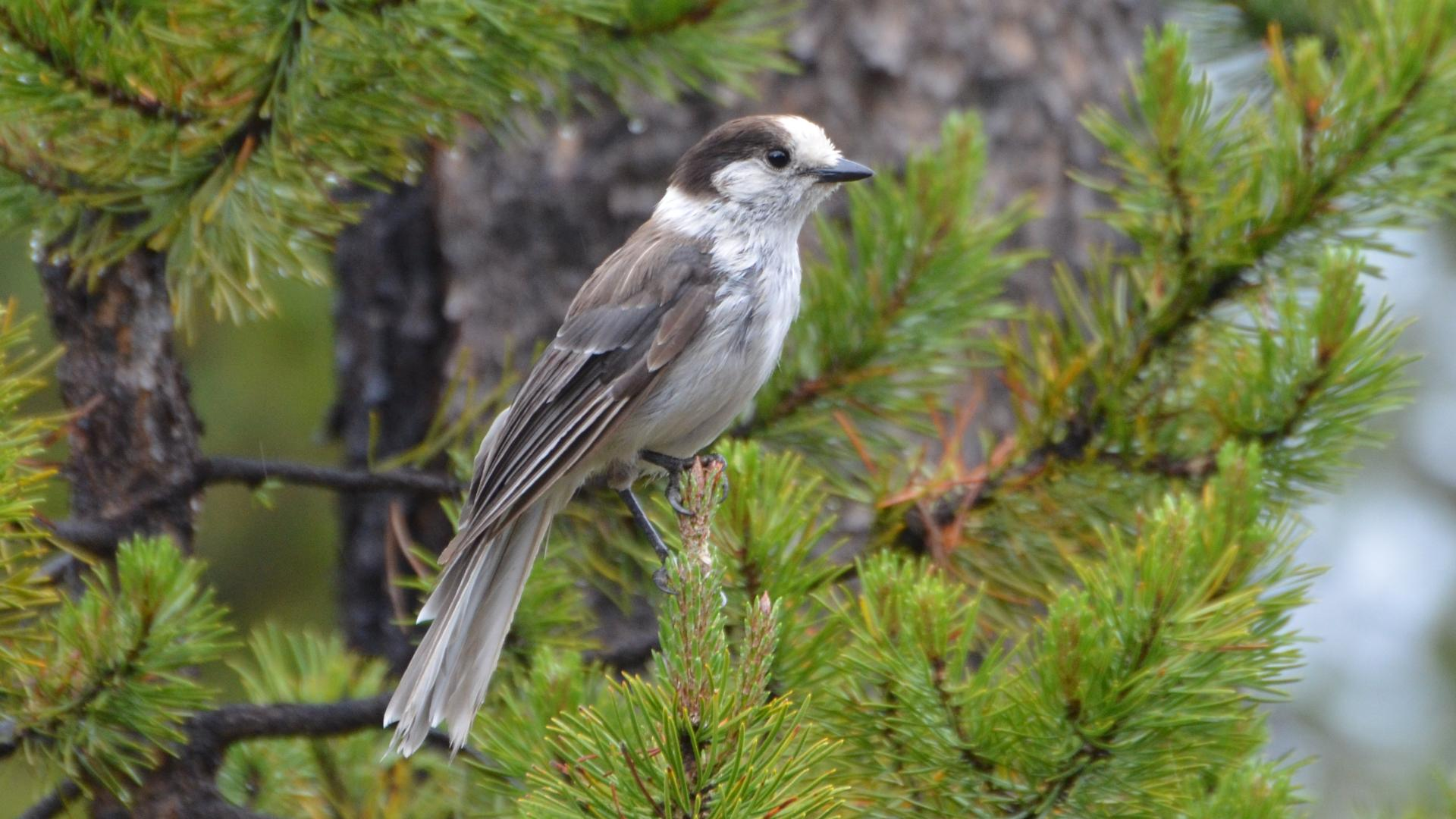 Oregon 2014